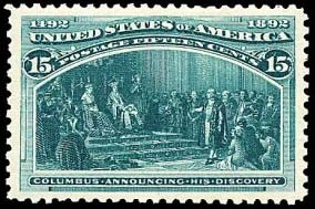 Columb înaintea Elisabetei şi lui Ferdinand.